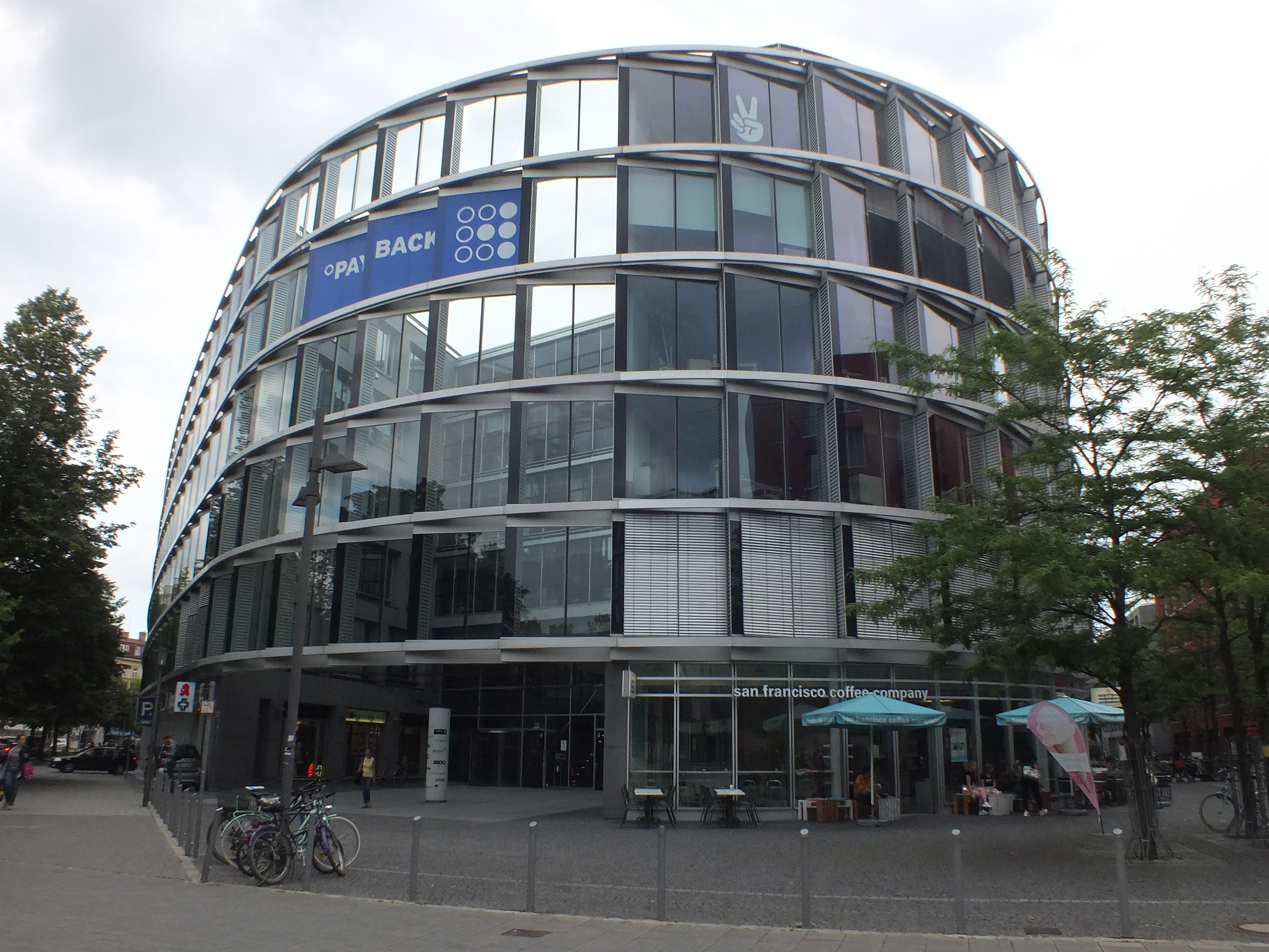 siehe Medienlegende